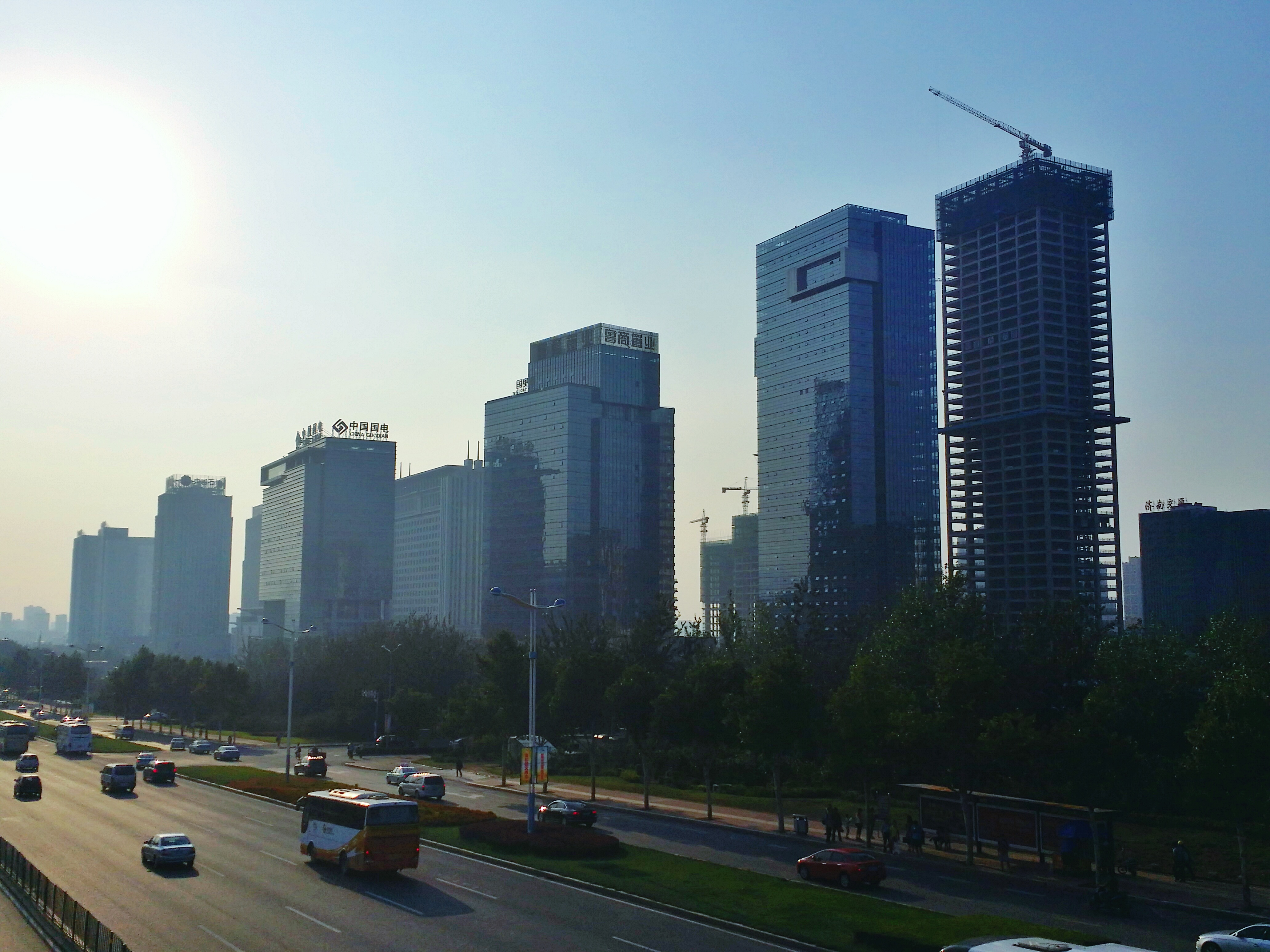 中文（中国大陆）: JinanaotiCBD